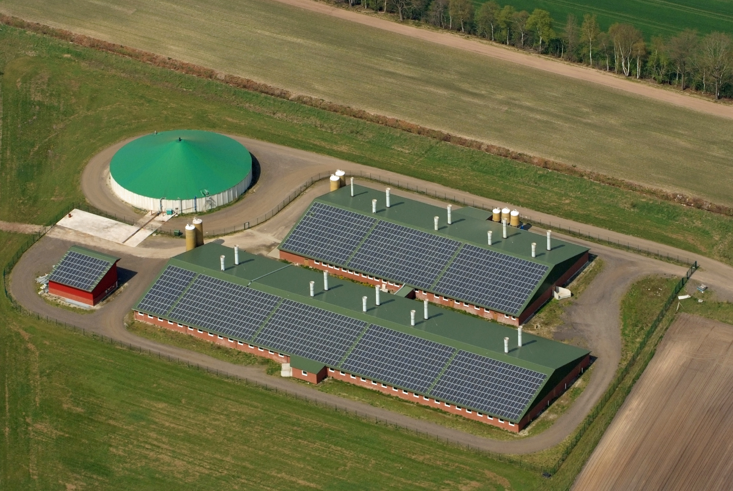 Fotoflug von Nordholz-Spieka nach Oldenburg und Papenburg